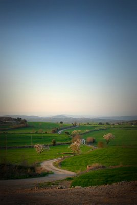 Camps Cabanabona